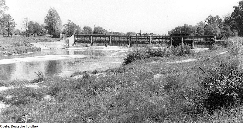 Original image description from the Deutsche Fotothek Krauschwitz-Klein Priebus. Neißewehr